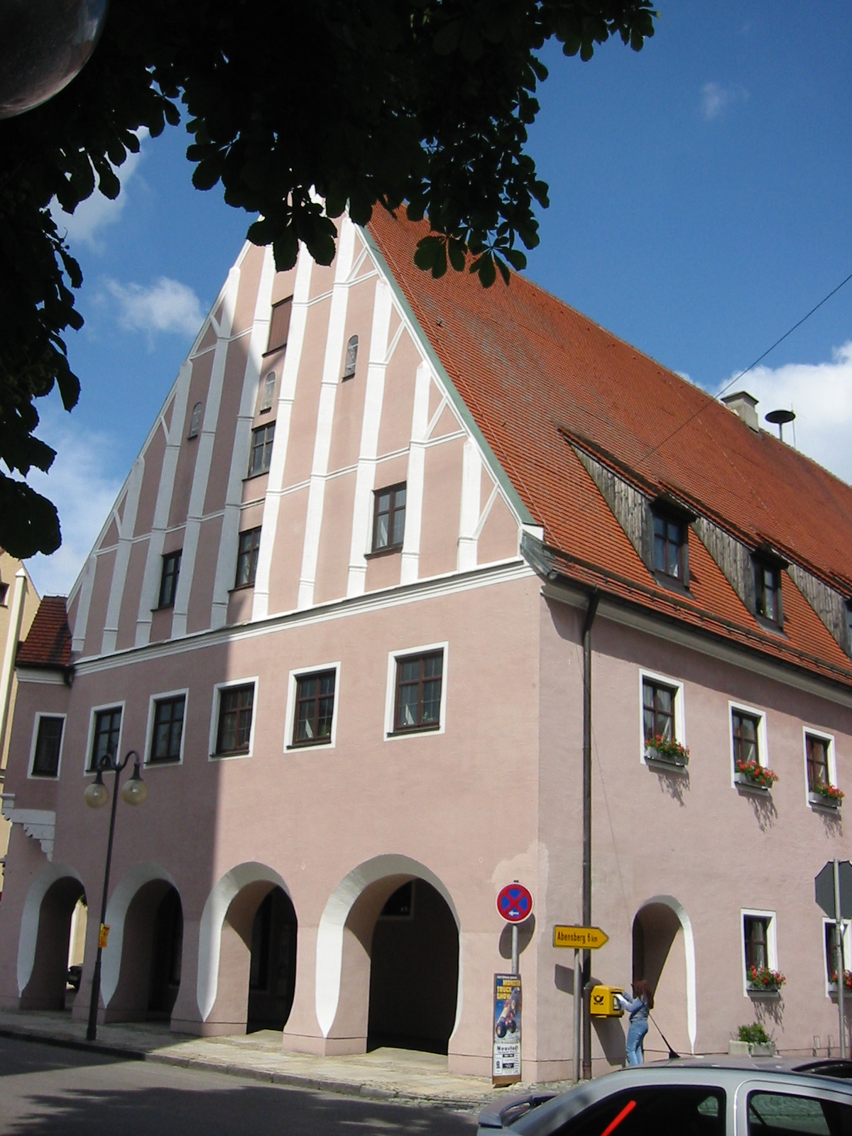 Spätgotisches Rathaus der Stadt Neustadt a. d. Donau